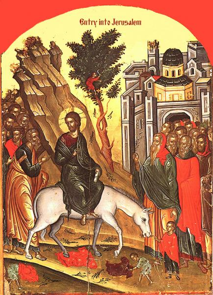 Entry into Jerusalem (ortodox icon)